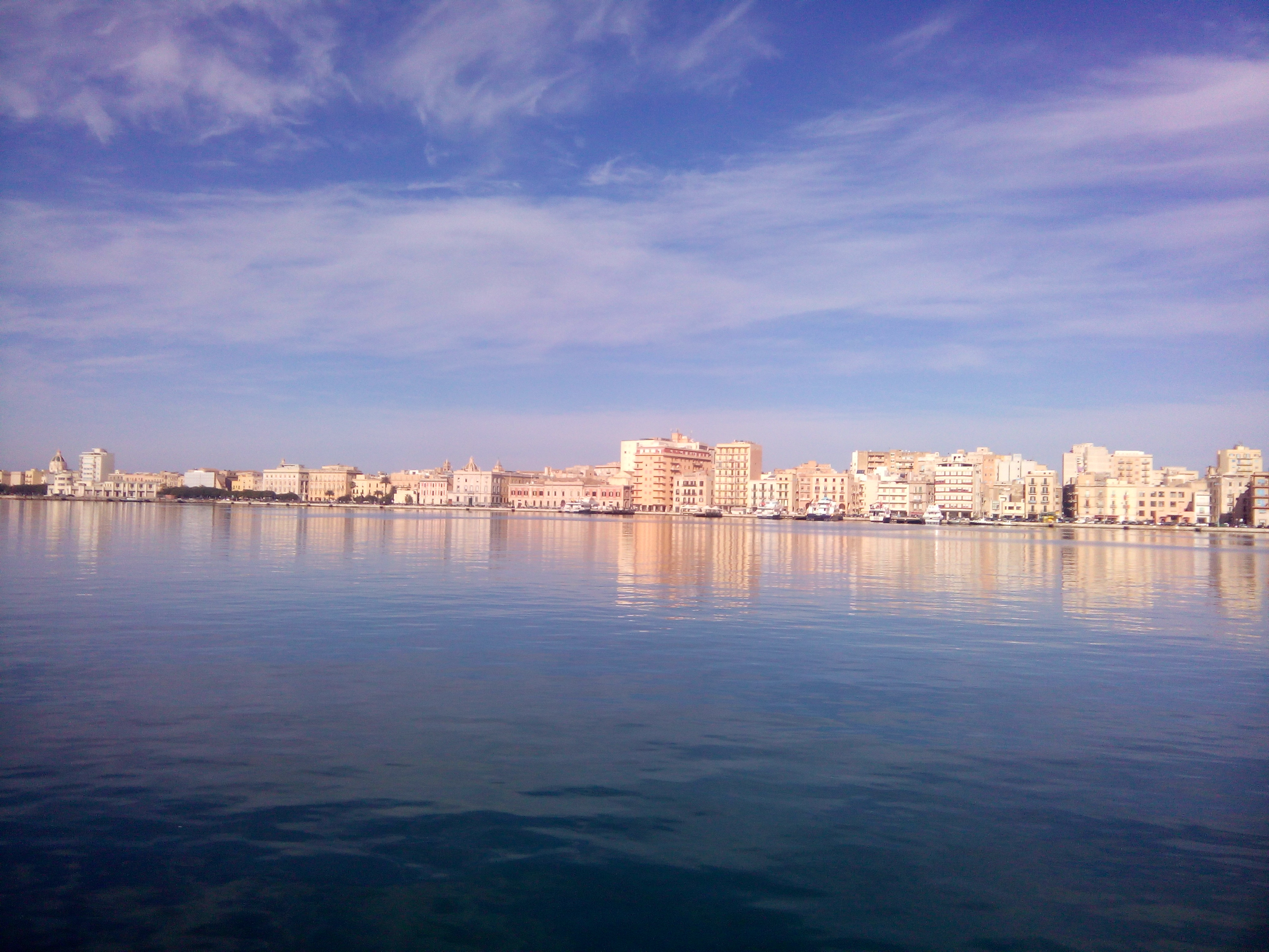 Trapani - Fronte del porto